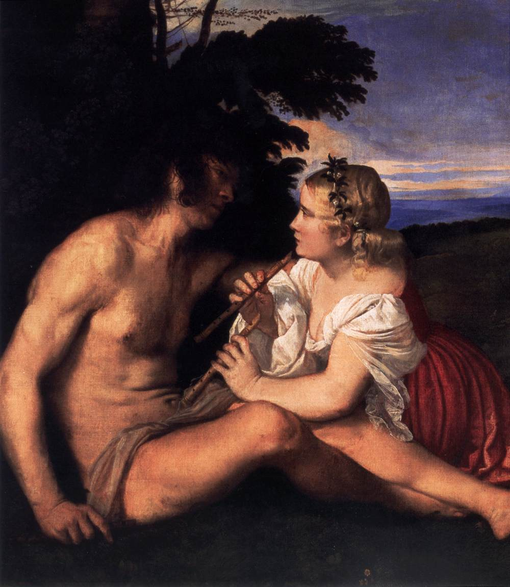 detail